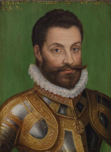 Emanuele Filiberto von Savoyen